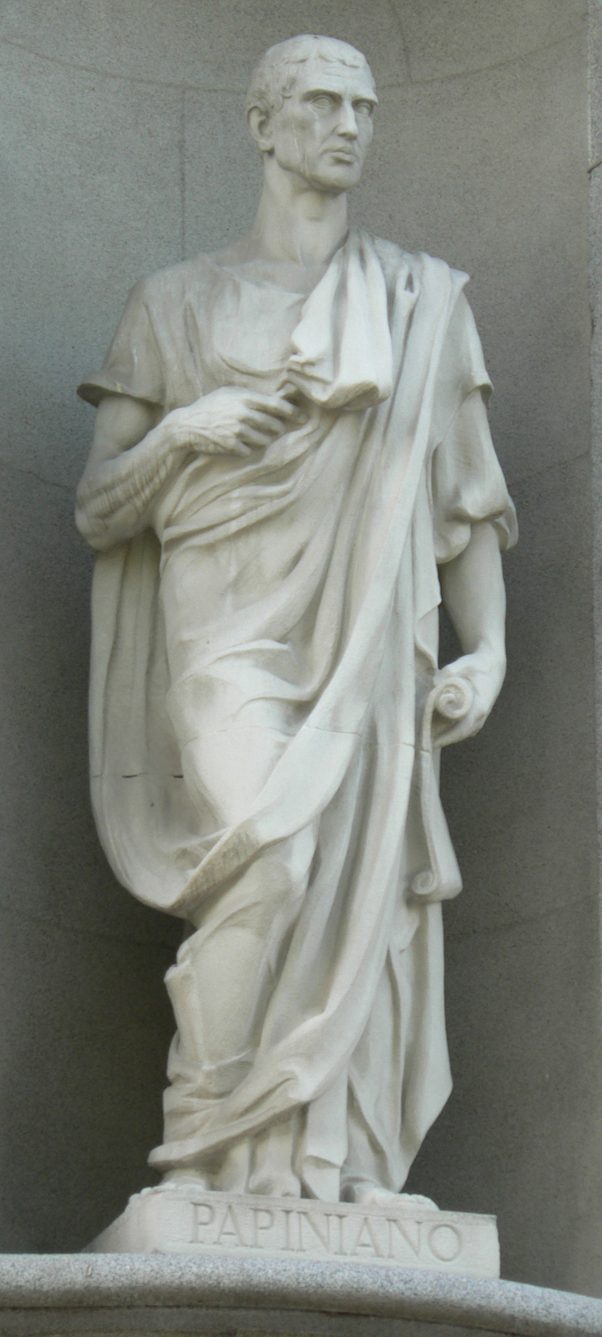 Estatua de Emilio Papiniano (en latín, Aemilius Papinianus), también conocido simplemente por el nombre de Papiniano, (Siria?, 150? - Roma, 212), magister libellorum y prefecto del pretorio del emperador Septimio Severo. En la fachada del Tribunal Supremo (Madrid).